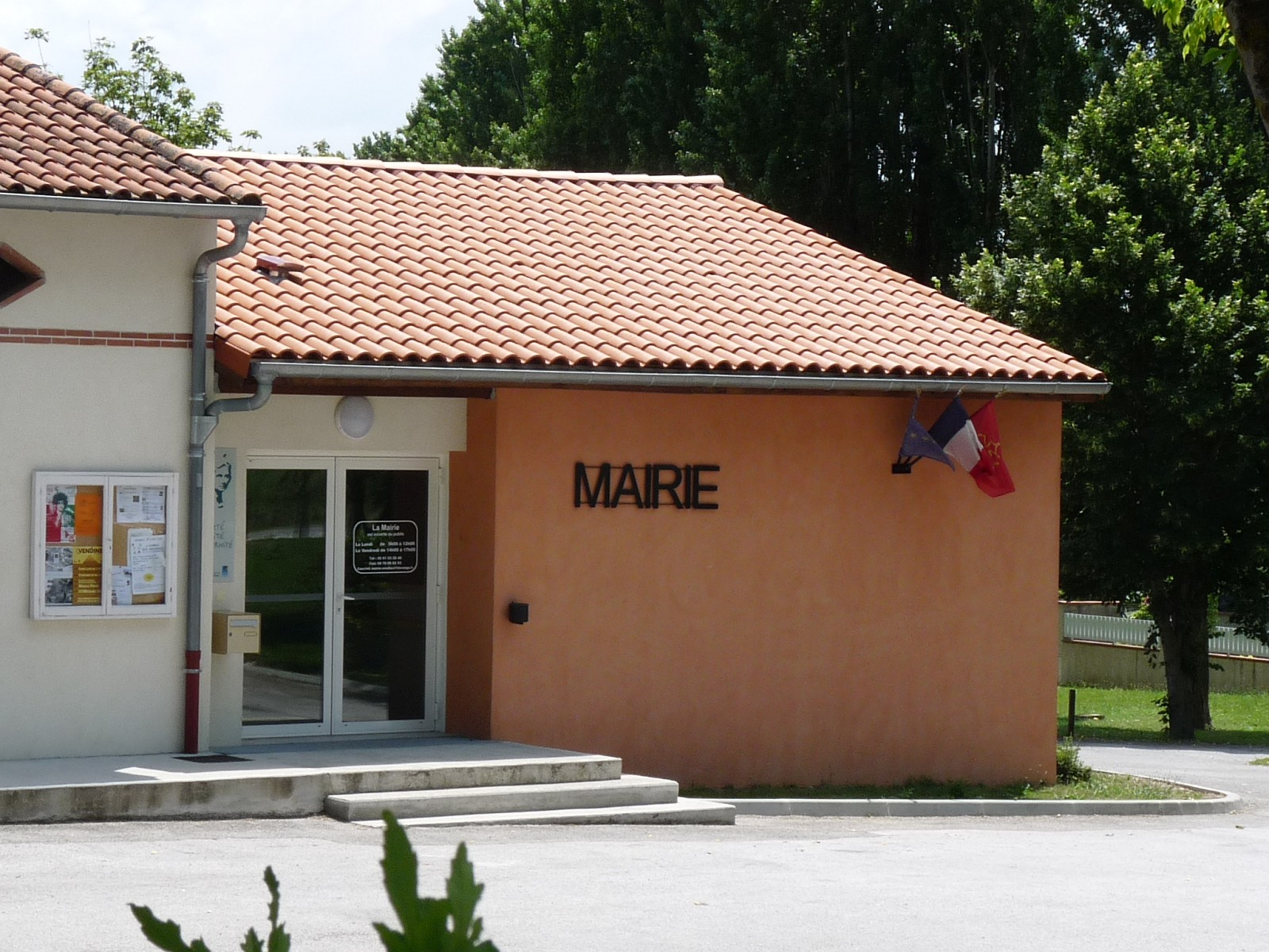 Mairie de Vendine, Haute-Garonne, France